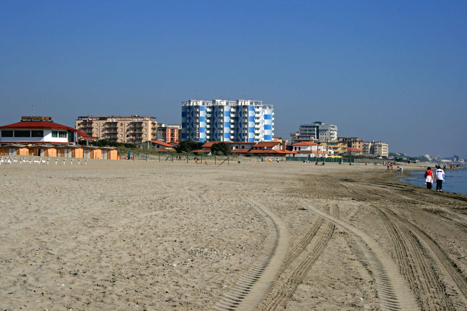 Lido degli Scacchi